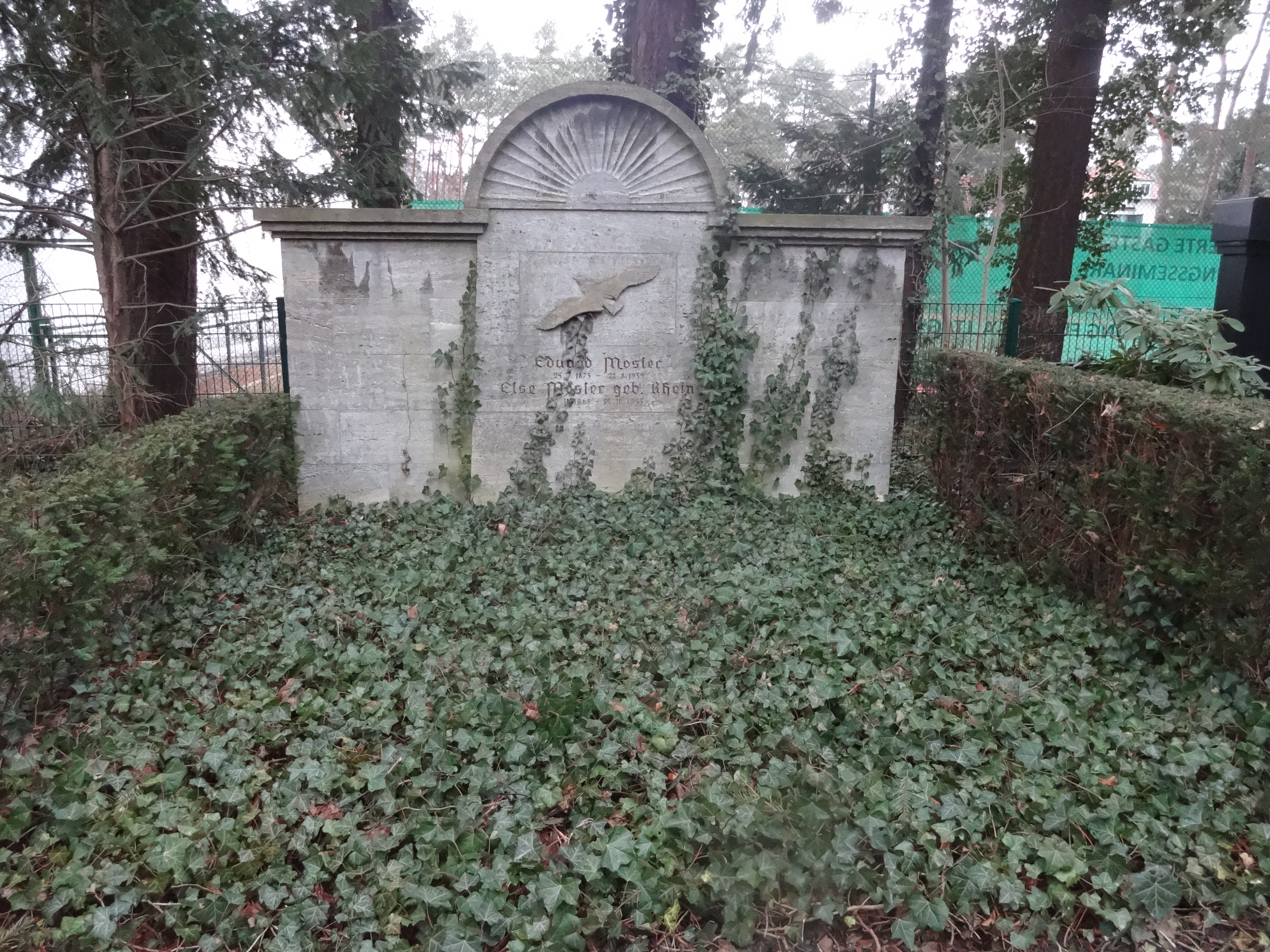 Grab von Eduard Mosler auf dem Evangelischen Kirchhof Nikolassee in Berlin